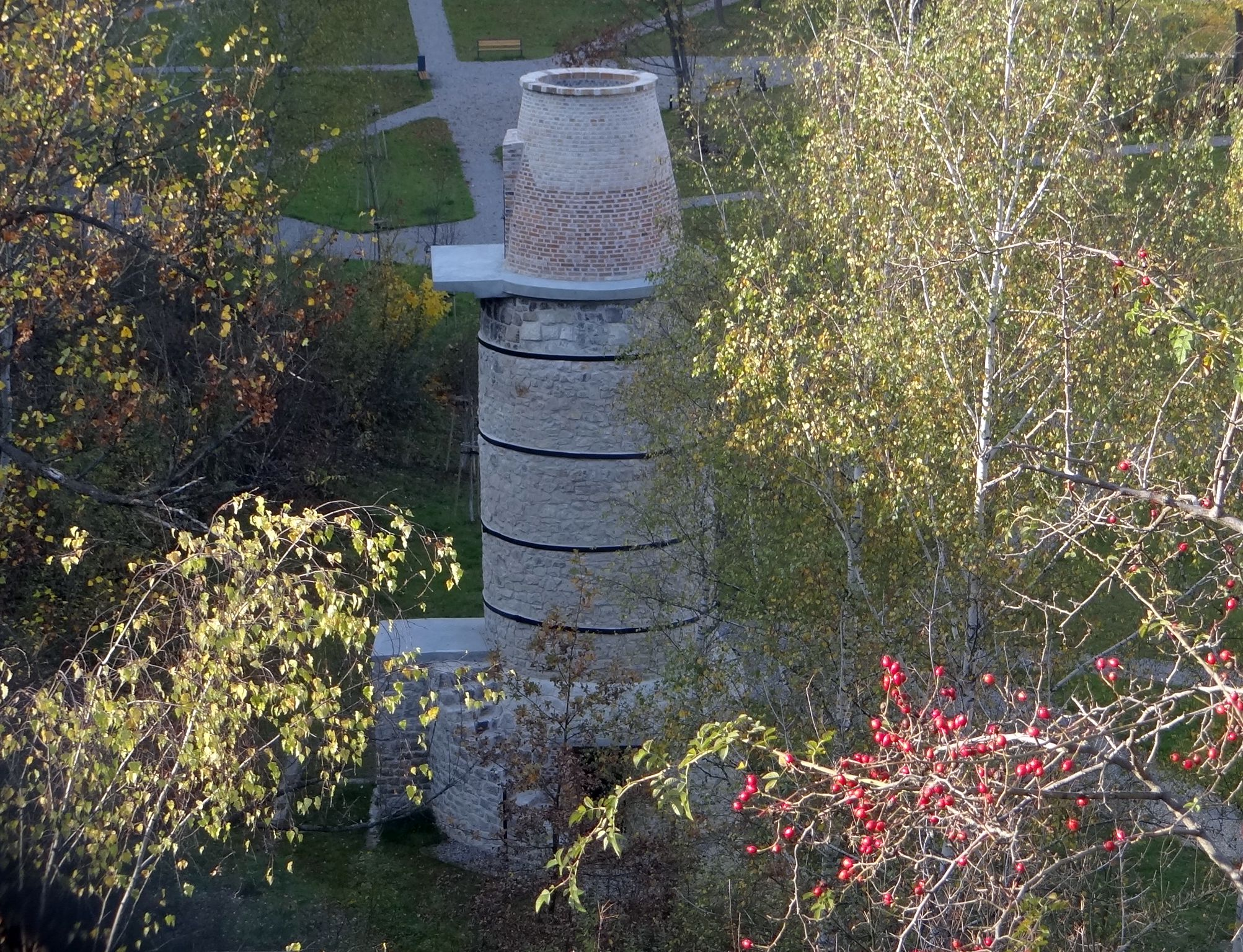 Wapiennik w Kamieniołomie Miejskim na Krzemionkach w Krakowie